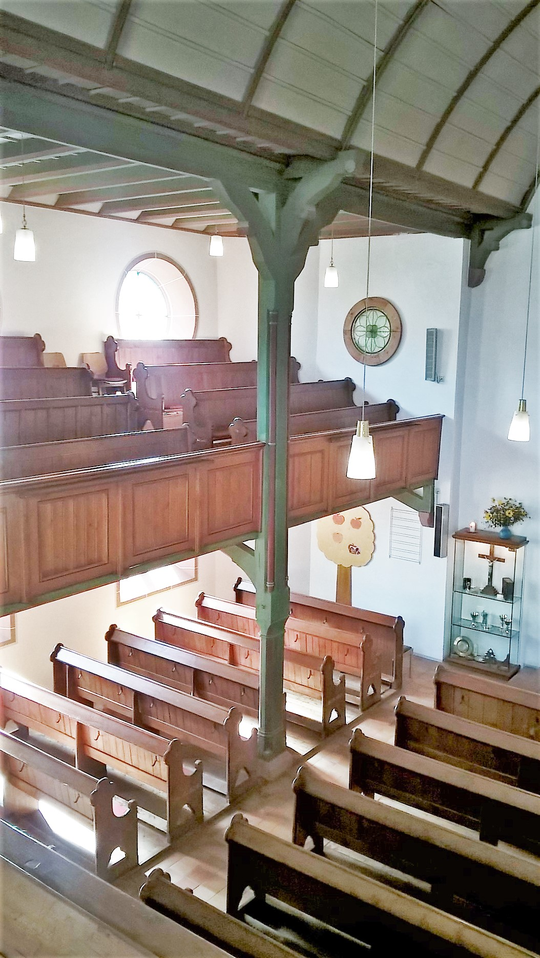 Evangelische Kirche Fellingshausen, Biebertal, Landkreis Gießen, Hessen, Deutschland